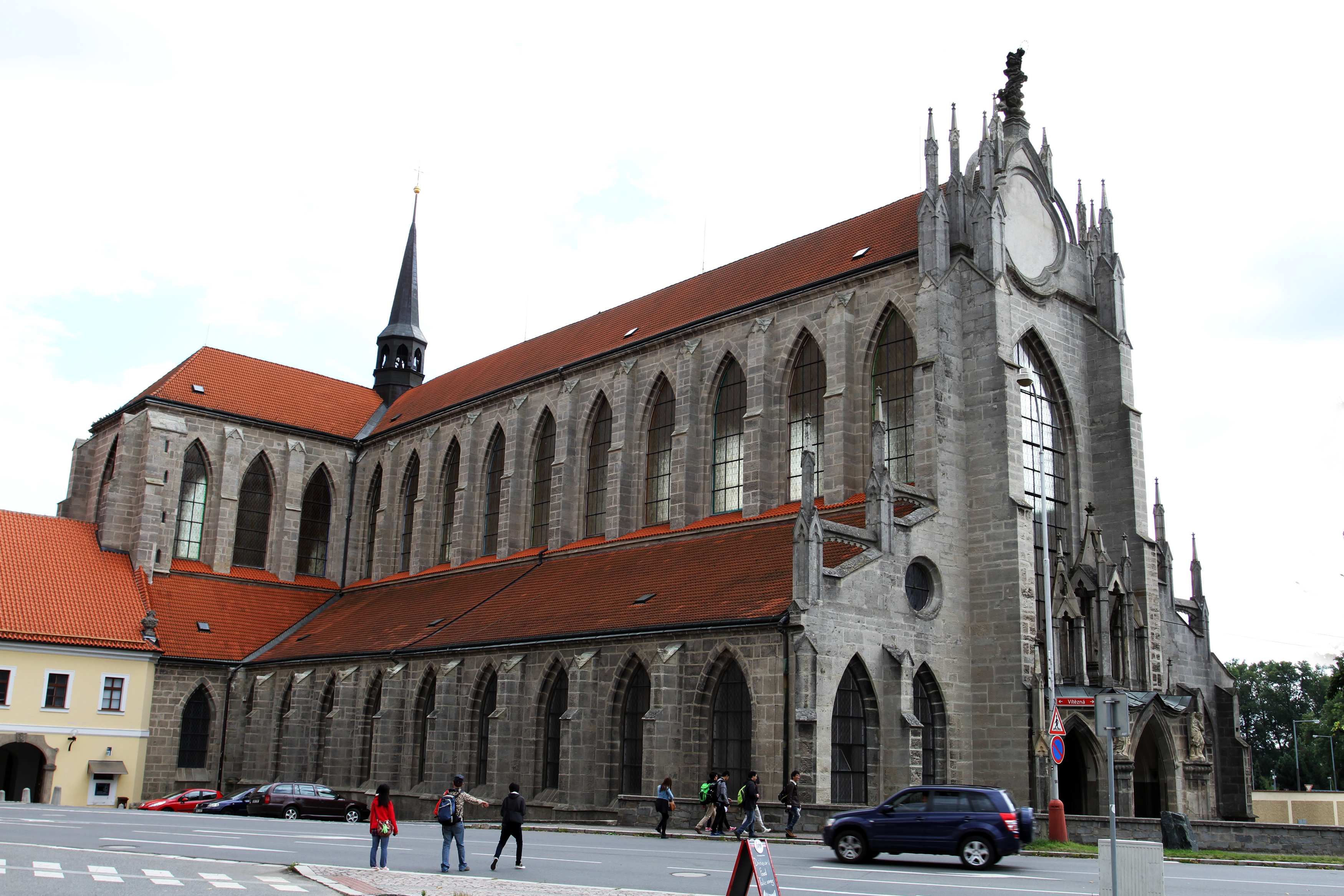 Klášter cisterciácký, s omezením: bez budovy jídelny (Sedlec), Sedlec 1